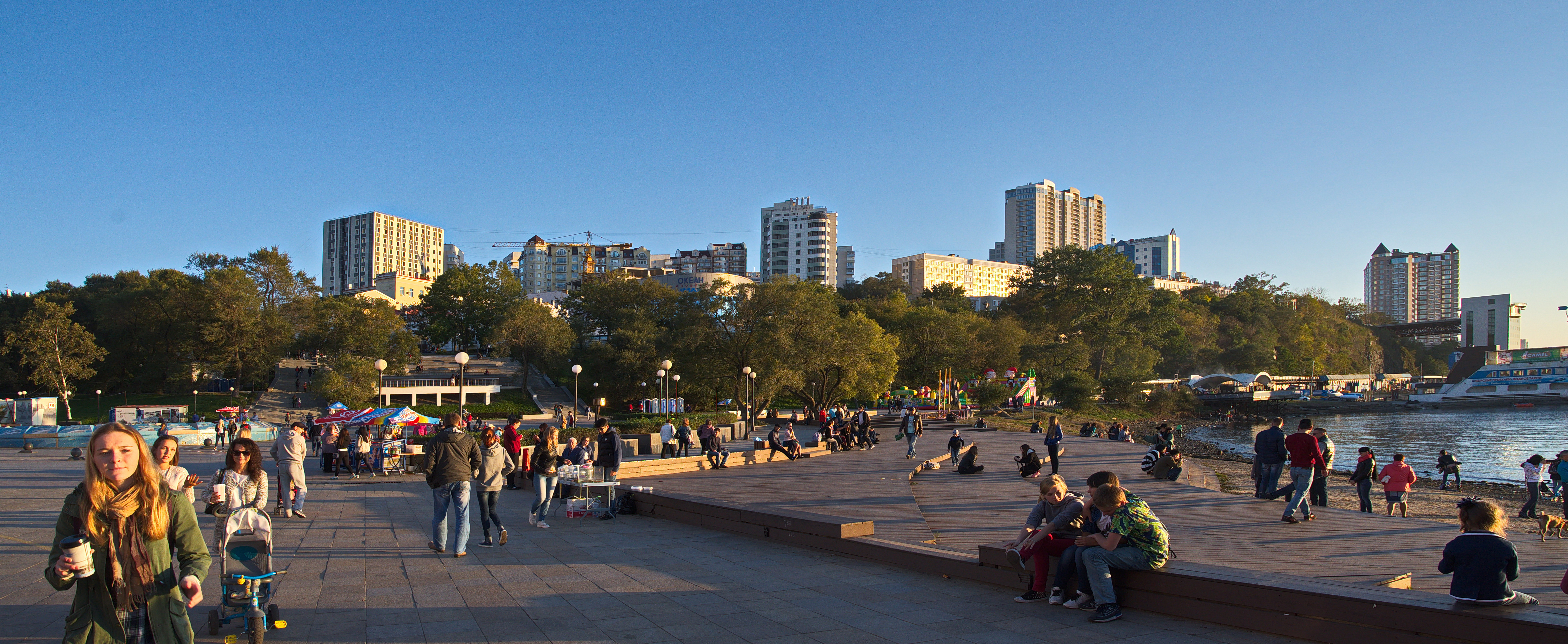 125 - Wladiwostok 2015